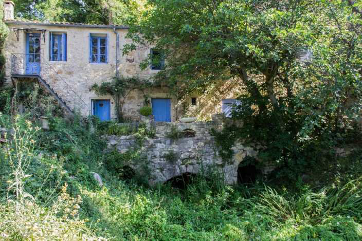 Photo de la face sud du Moulin Neuf en 2014